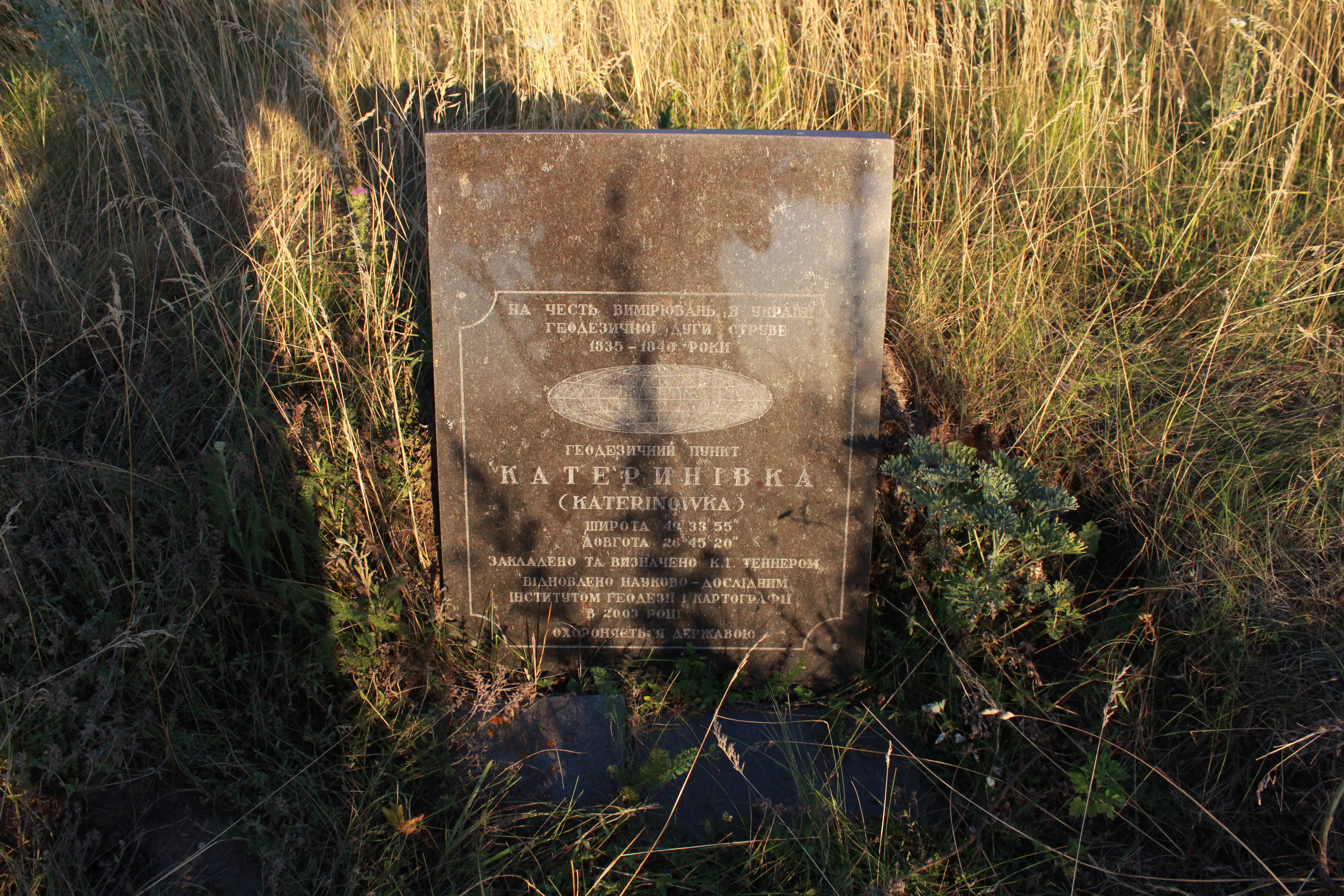 Геодезичний пункт дуги Струве «Катеринівка», село Катеринівка, 1 км на північ від с. Катеринівка